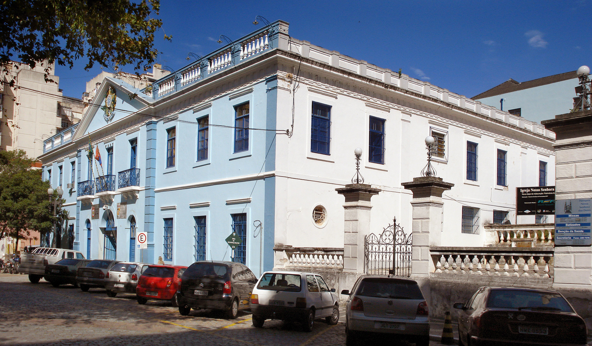 8ª Circunscrição do Serviço Militar do Comando Militar do Sul, Porto Alegre, Brasil.